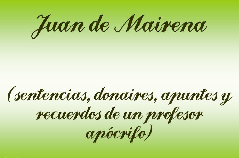 Composición (falso logo) a propósito del apócrifo de Antonio Machado: Juan de Mairena, profesor de gimnasia andaluz.